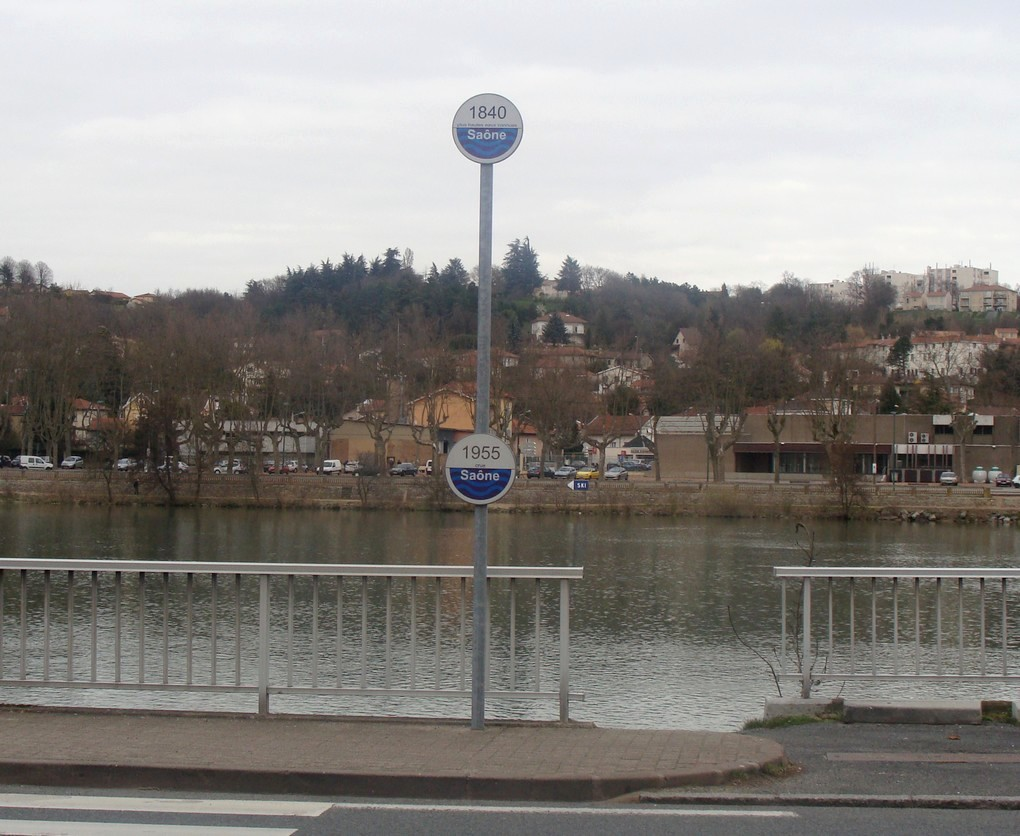 Balise indiquant deux crues remarquables de la Saône. Cette balise est placée sur la rive droite de la rivière, à l'entrée nord d'Albigny-sur-Saône, juste avant le pont de Neuville-sur-Saône ; en face, Neuville-sur-Saône.